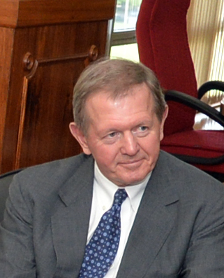 30/03/2015, Brasília - DF Fotos: PH Freitas